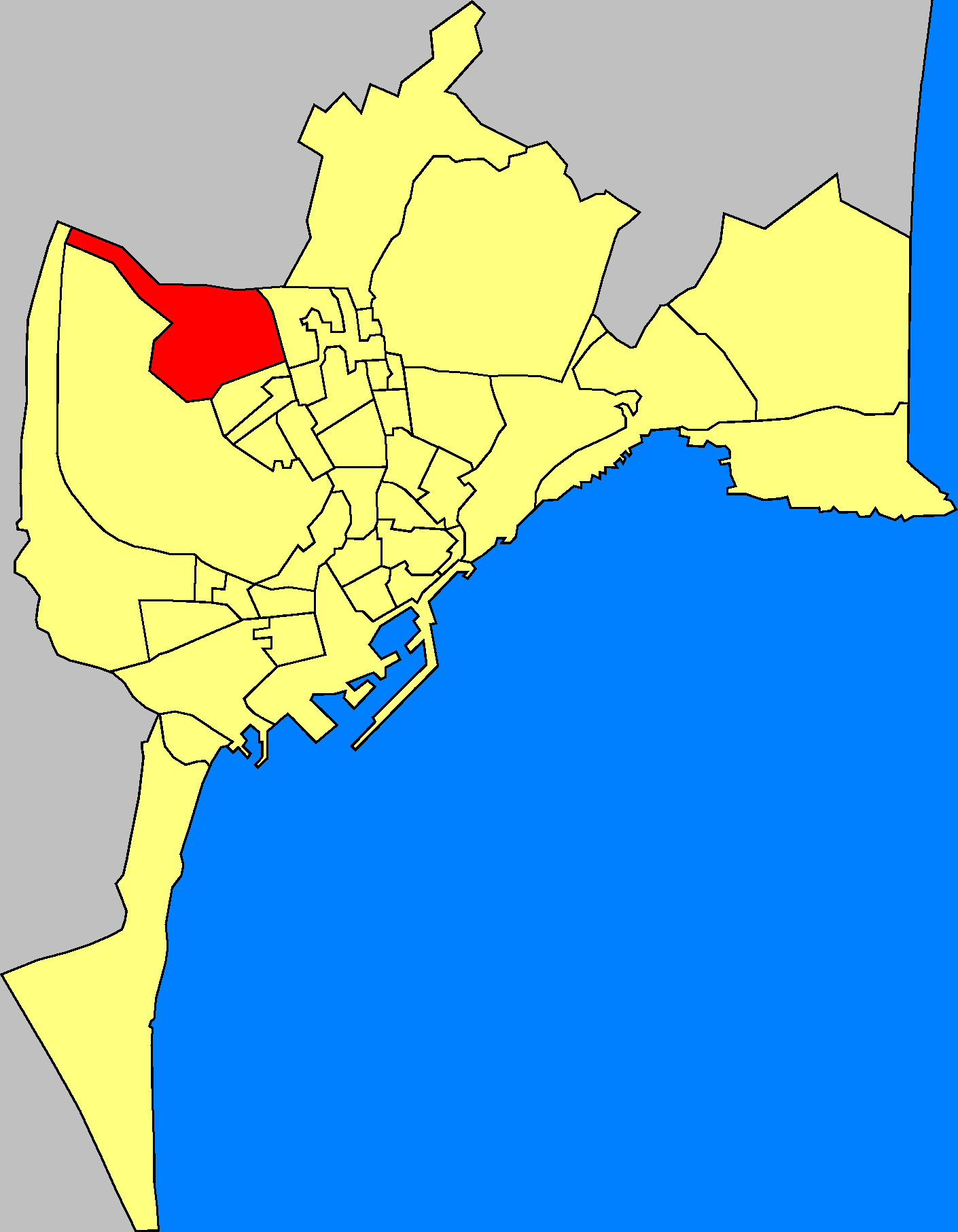 Barrios de la ciudad de Alicante